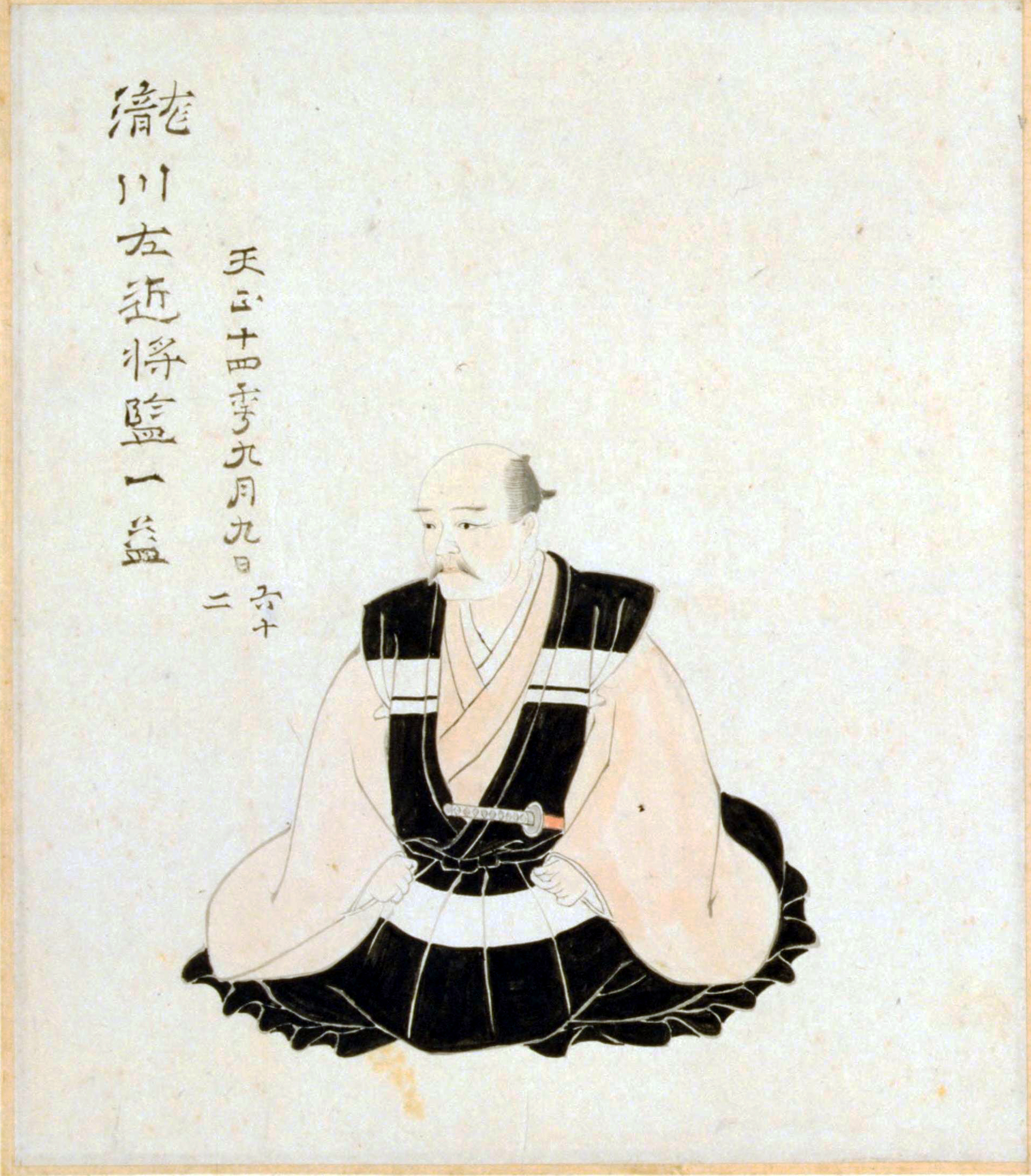 肖像集 ７. 滝川一益